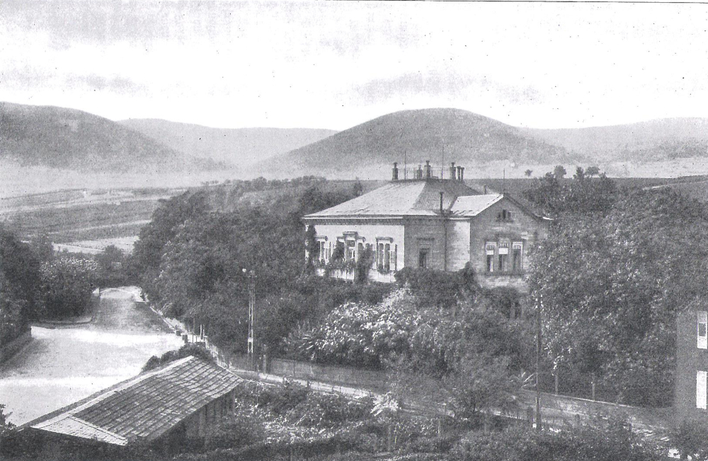 Weingut von Winning, Ansicht von Süden, vor 1914